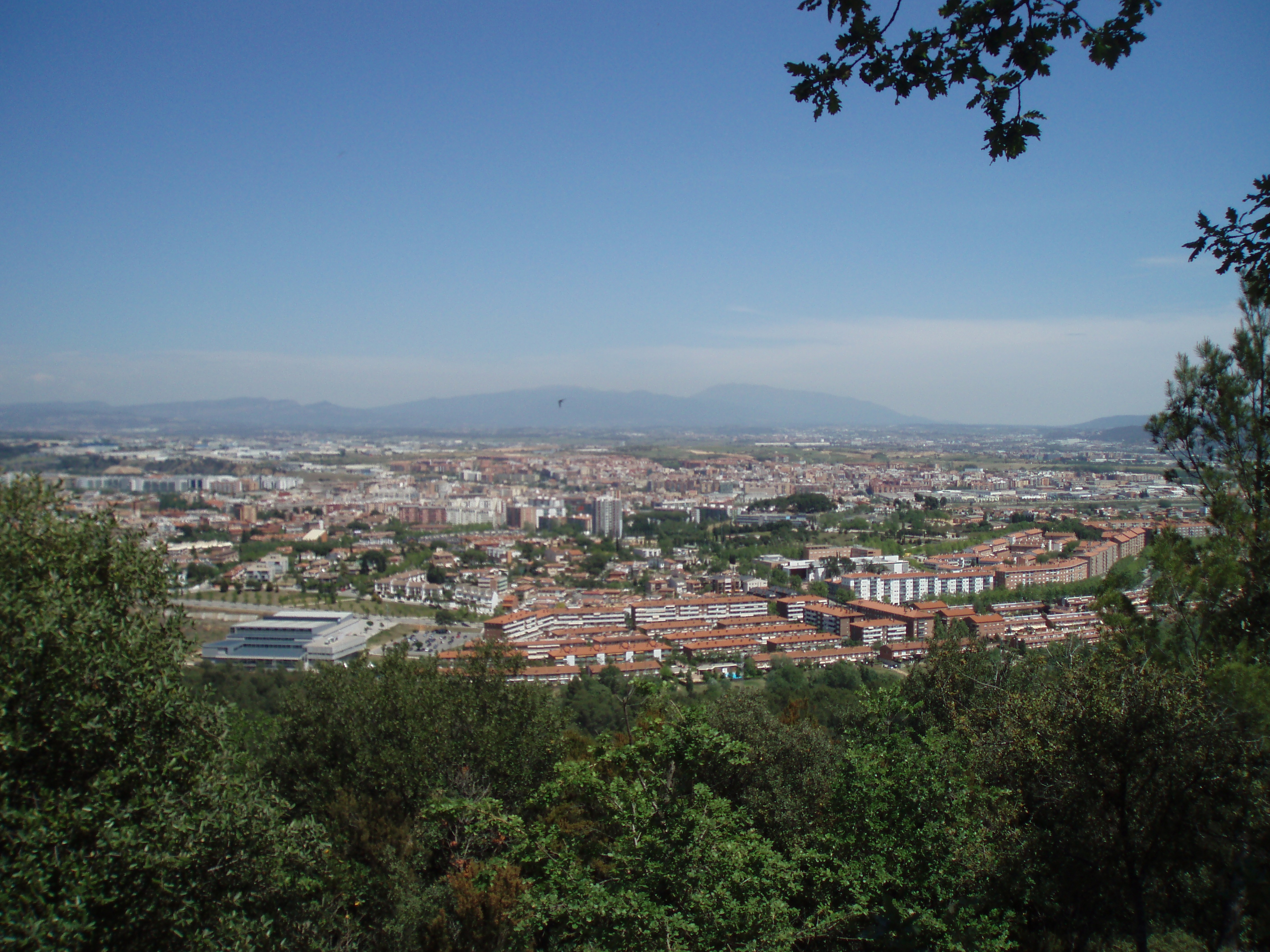 Foto de les vistes de la plana del Vallès (Occidental) des del Puig de la Guàrdia (Cerdanyola del Vallès)